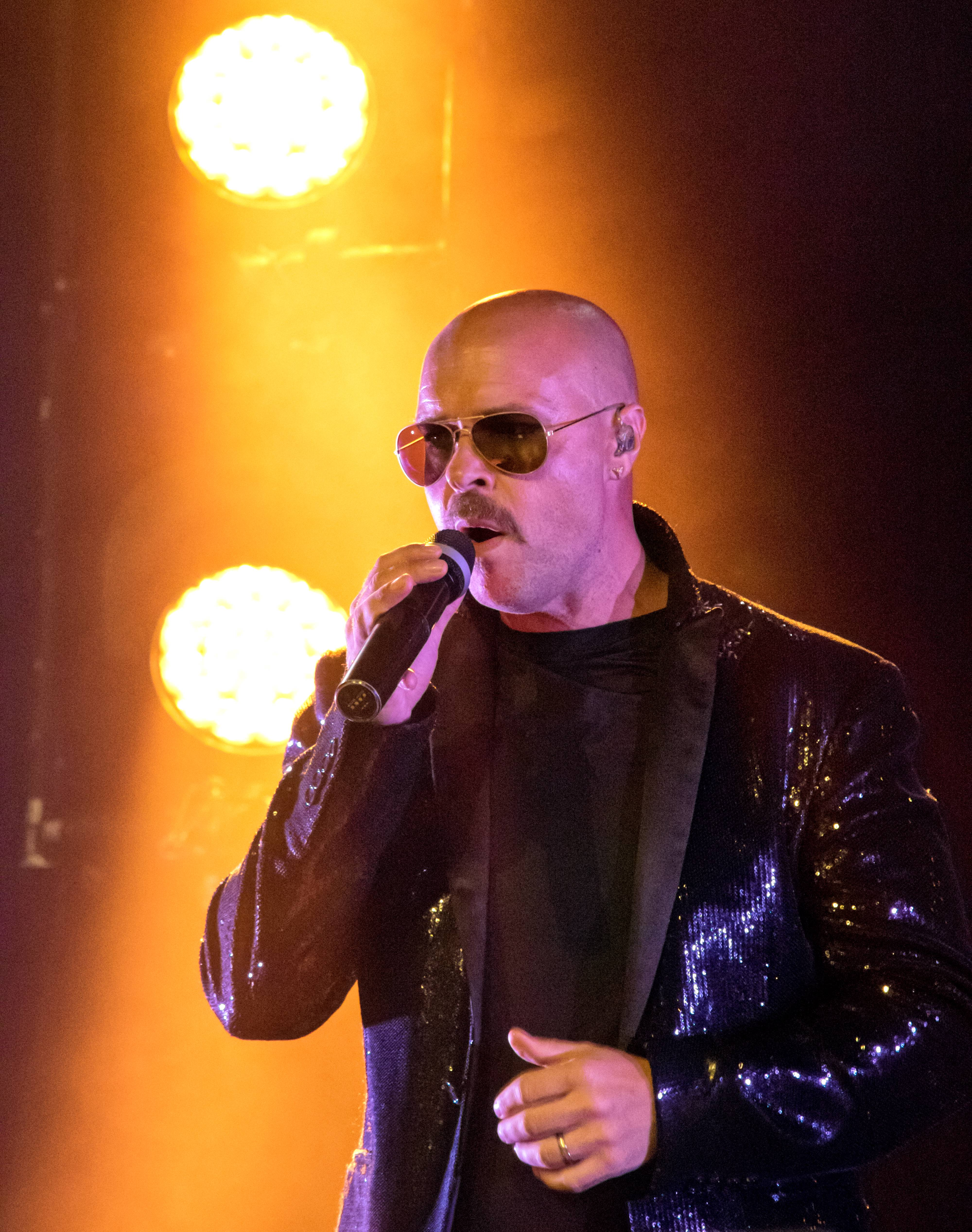 Bilder vom ZMF 2015,die Gala FORK am 15. Juli 2015